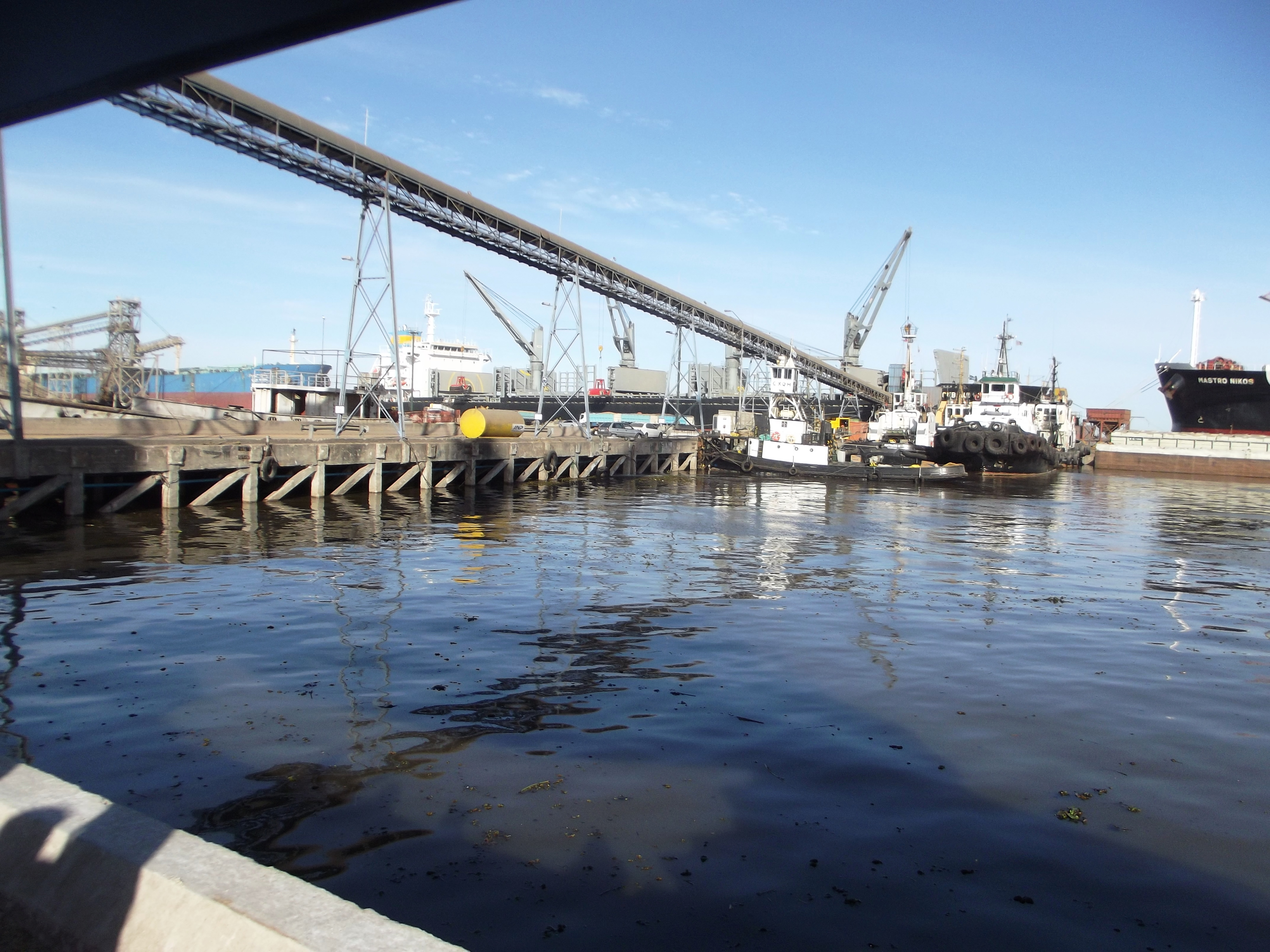 Puerto ubicado en el departamento de Colonia, Uruguay.